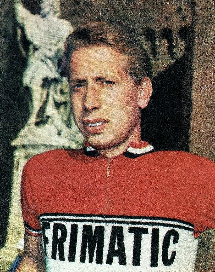 Figurina Campioni dello Sport PANINI 1968/69 - N°197 JOURDEN